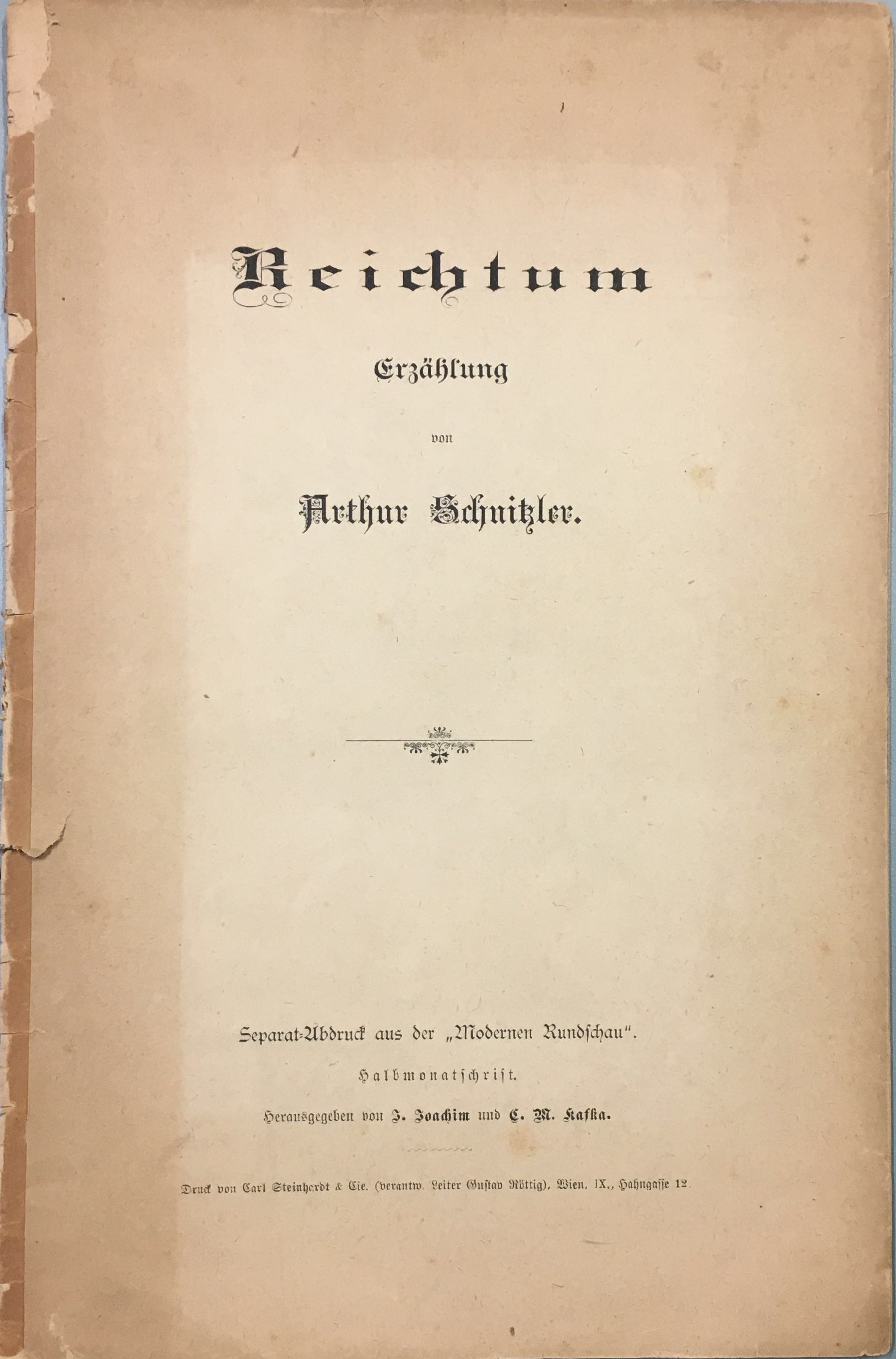 Arthur Schnitzler: Reichtum. Erzählung. Separat-Abdruck aus der »Modernen Rundschau«